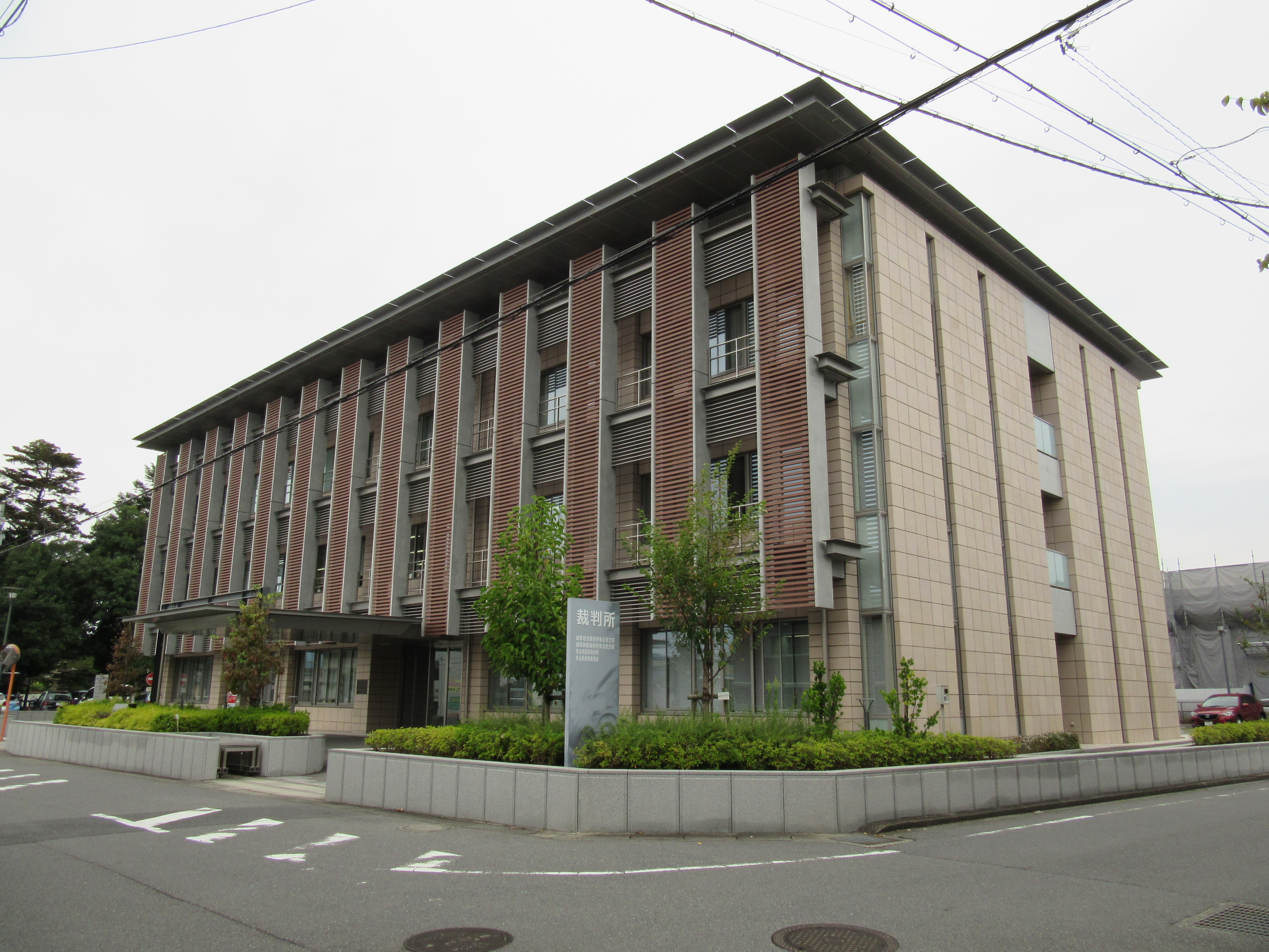 多治見簡易裁判所